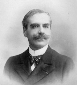 Photographie d'Emile Sénart